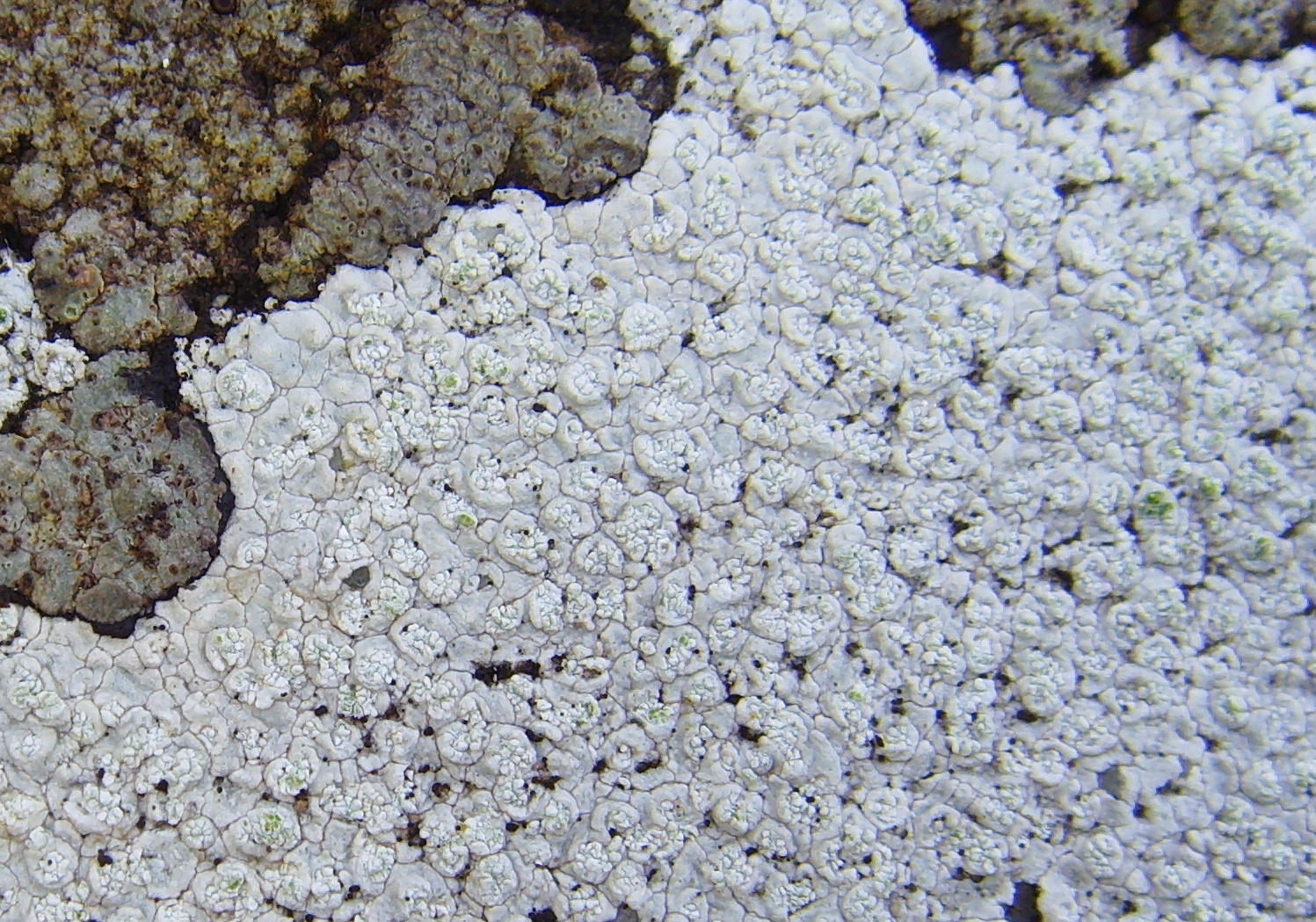 Pertusaria excludens, pointe du Raz (Plogoff, Finistère, Bretagne, France)